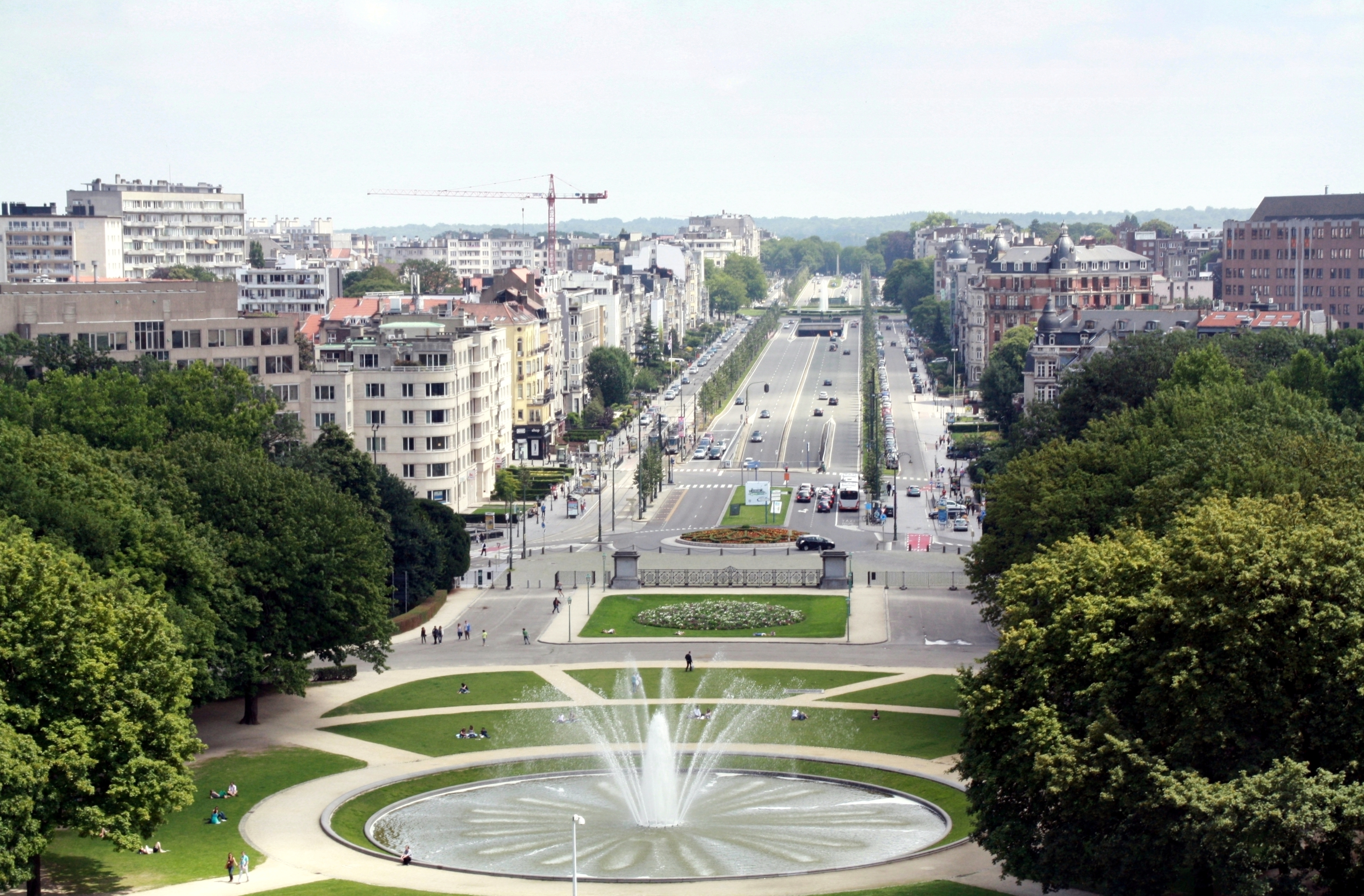 Bruksela z Łuku Triumfalnego